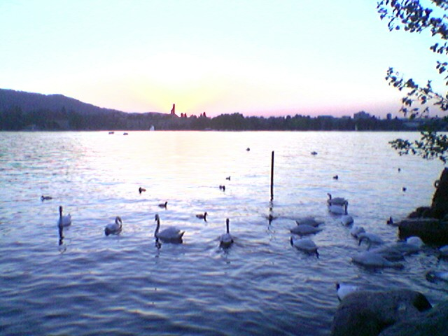 Mi (Didi Weidmann) faris ĉi- tiun bildon mem kaj posedas ĉiujn rajtojn pri ĝi. La bildo vundas nenies personajn rajtojn kaj posedaĵon kaj mi disponigas ĝin sub GNU-licenco al la ĝenerala publiko por libera uzo kaj reproduktado. Kategorio:Bildoj de Kantono Zuriko Kategorio:Bildoj alŝutitaj de DidiWeidmann Kategorio:Bildoj faritaj de DidiWeidmann